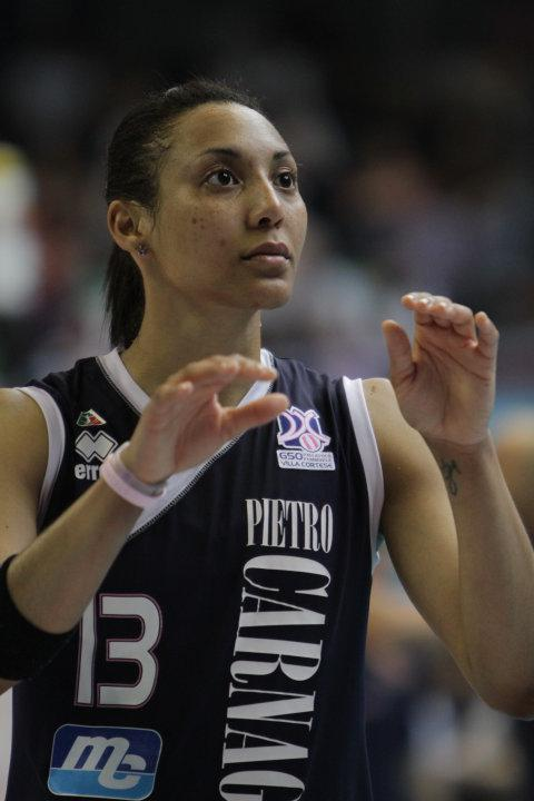 Aurea Cruz, pallavolista portoricana, gioca nel ruolo di schiacciatrice